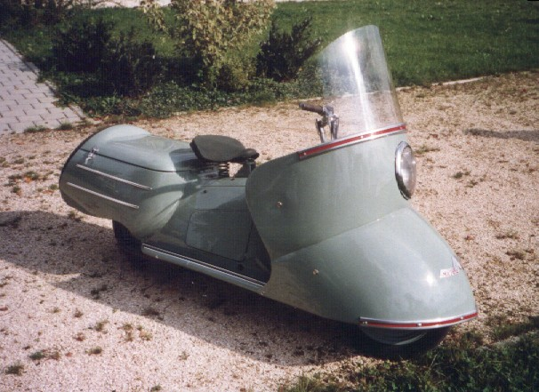 Foto meines Maicomobils Ostfildern 2005